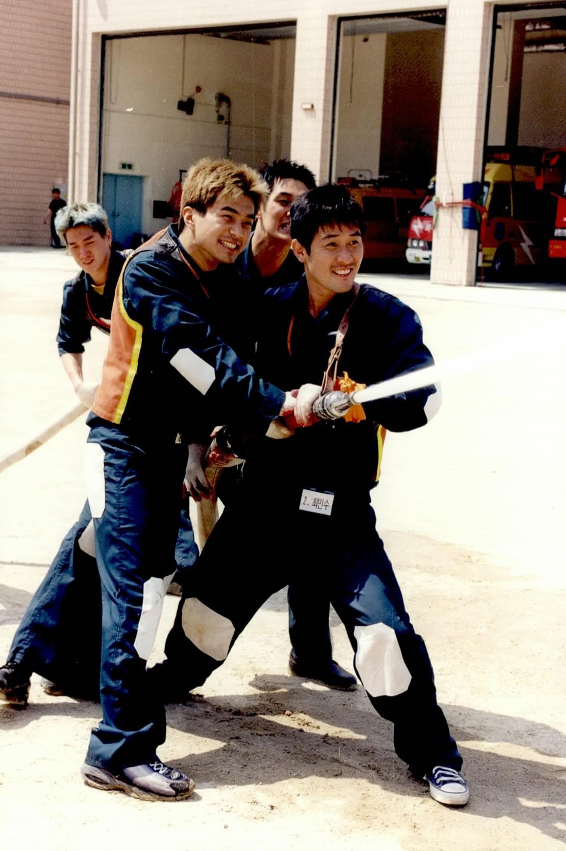 2000 소방 영화 '사이렌'과 '리베라메'